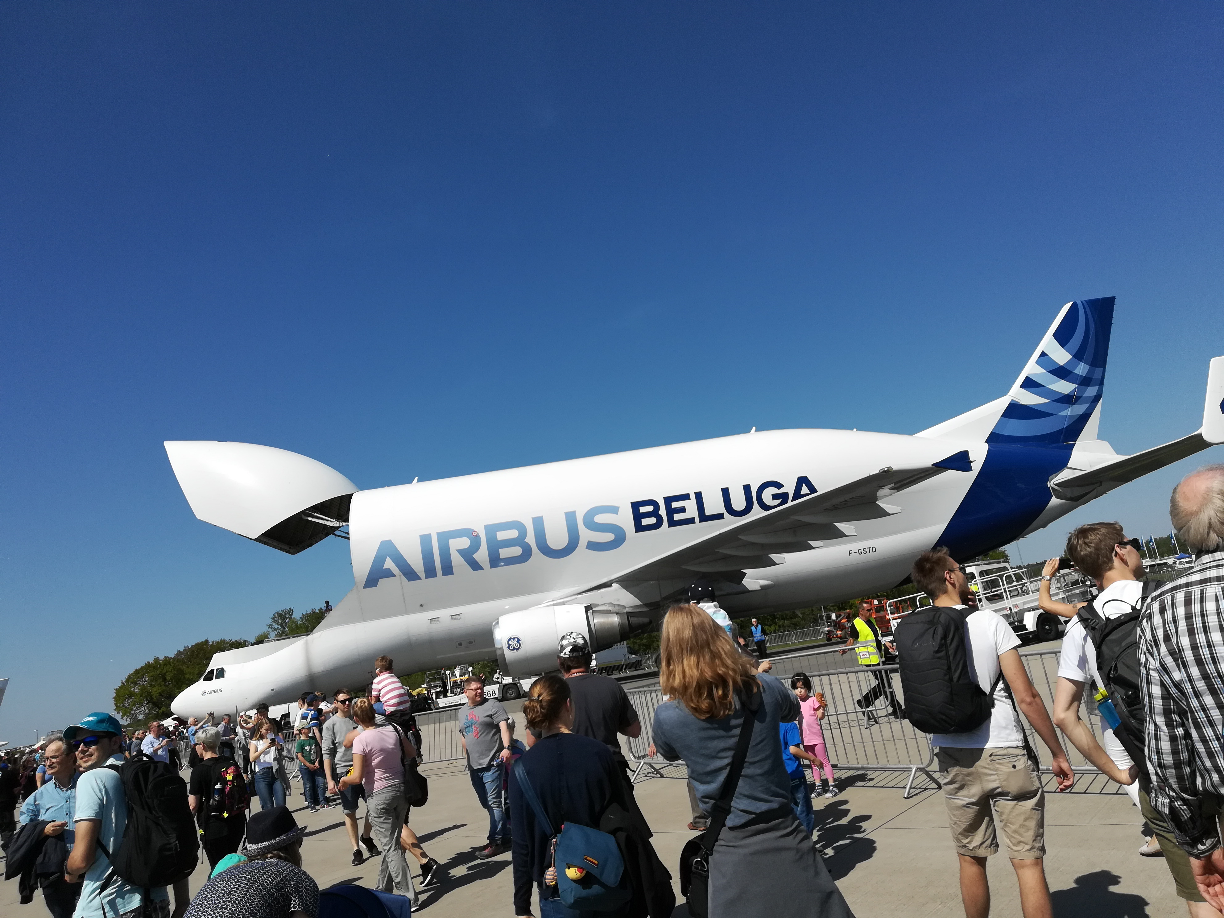 Das Flugzeug kam während der ILA 2018 zum Expo Center des BERs.